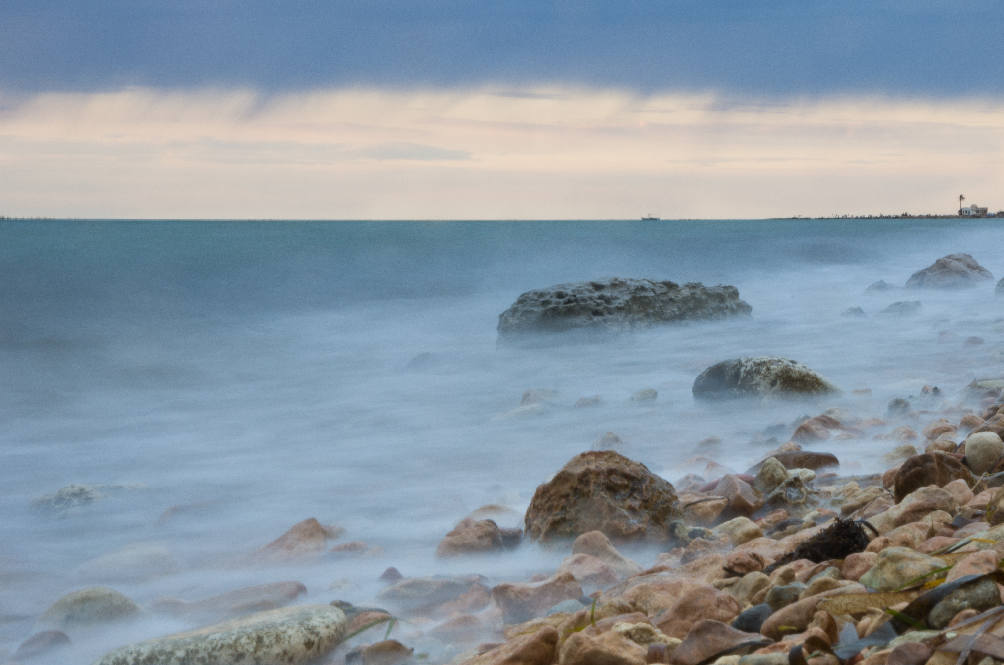 iles Kerkennah (Sidi Fredj) site RAMSAR